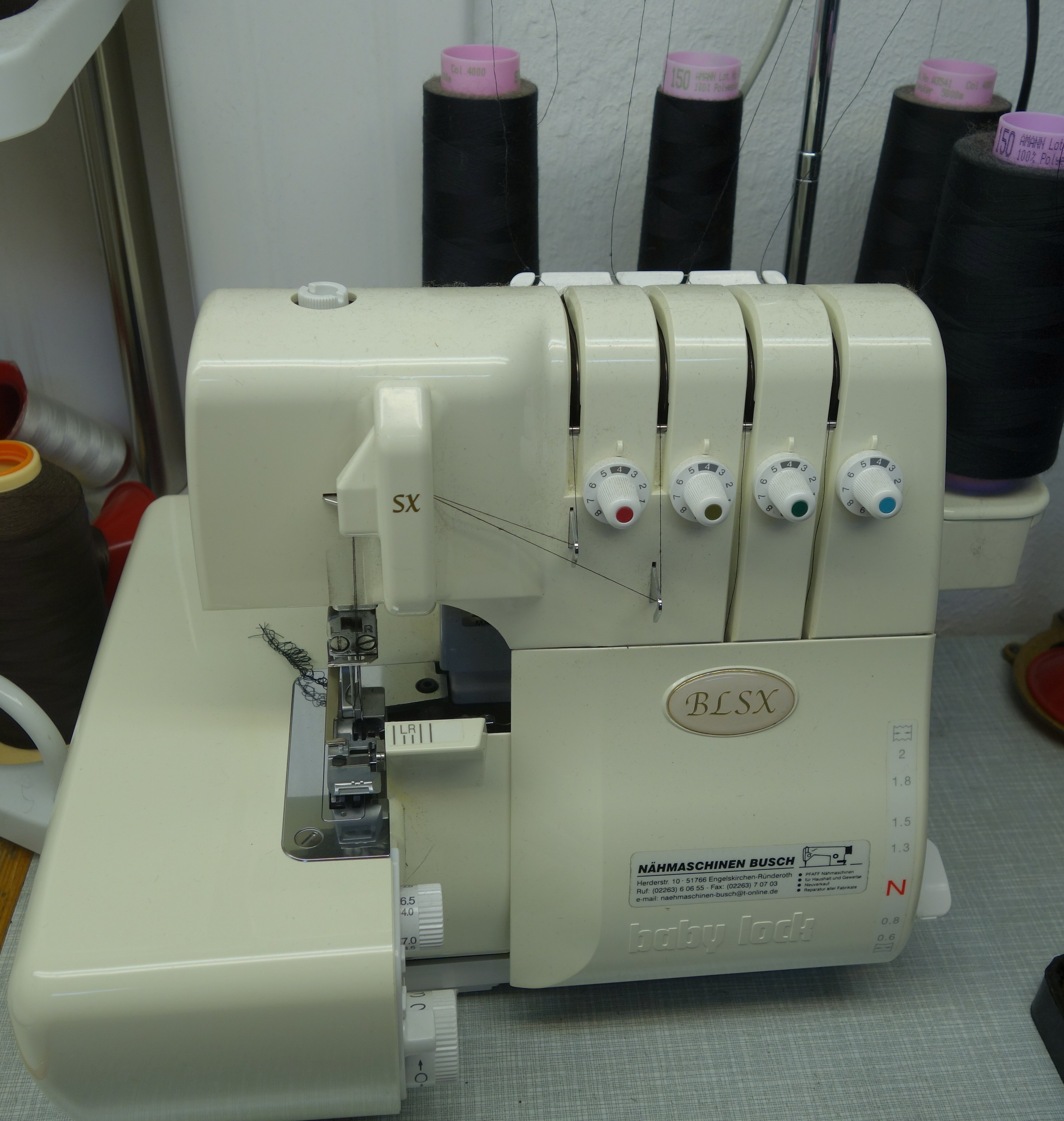 Overlock-Nähmaschine BLSX. Gesehen im Atelier der Firma Halfmann Pelzmanufaktur GmbH., Düsseldorf-Oberkassel.